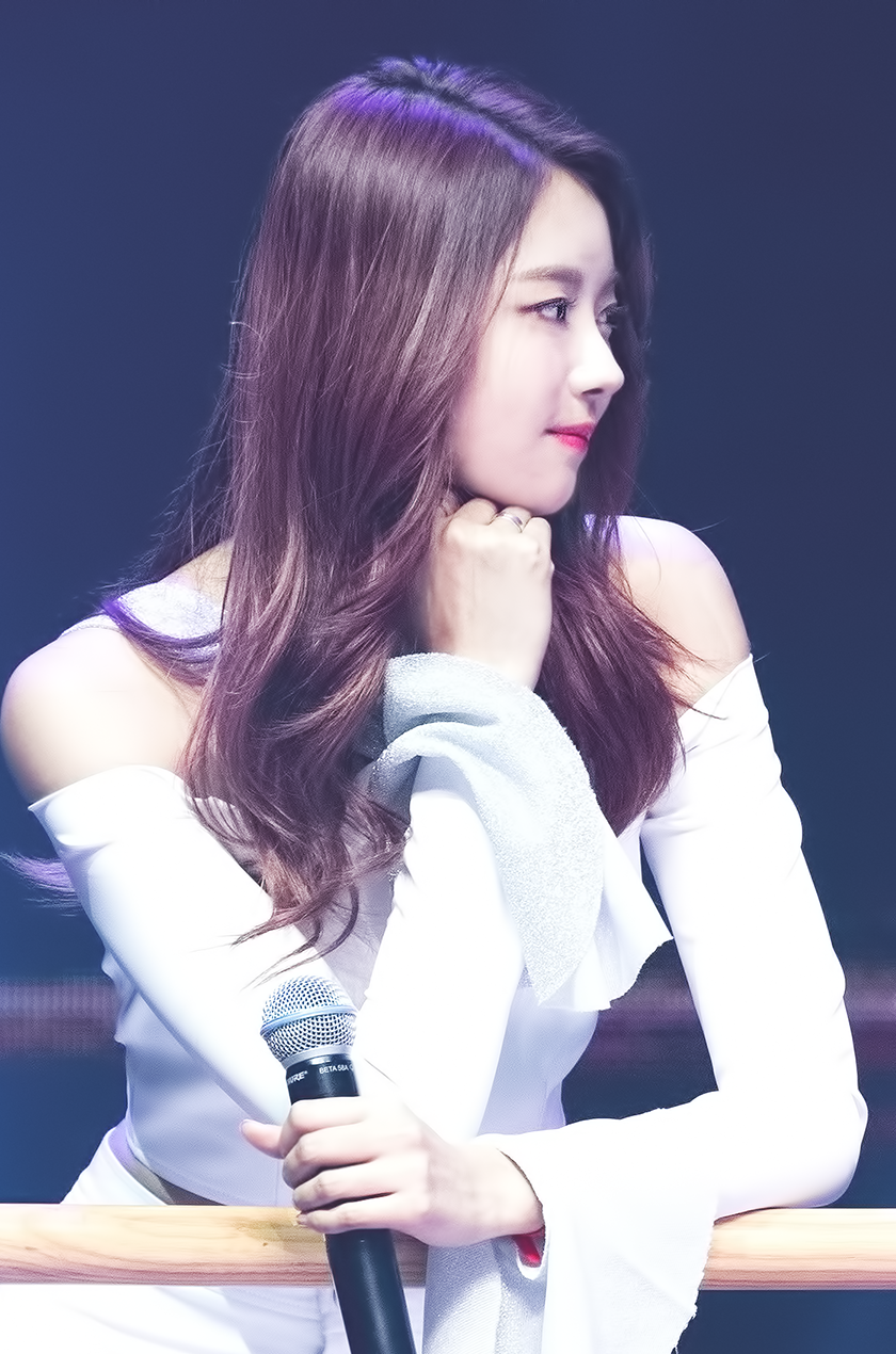 170322 프리스틴 쇼케이스